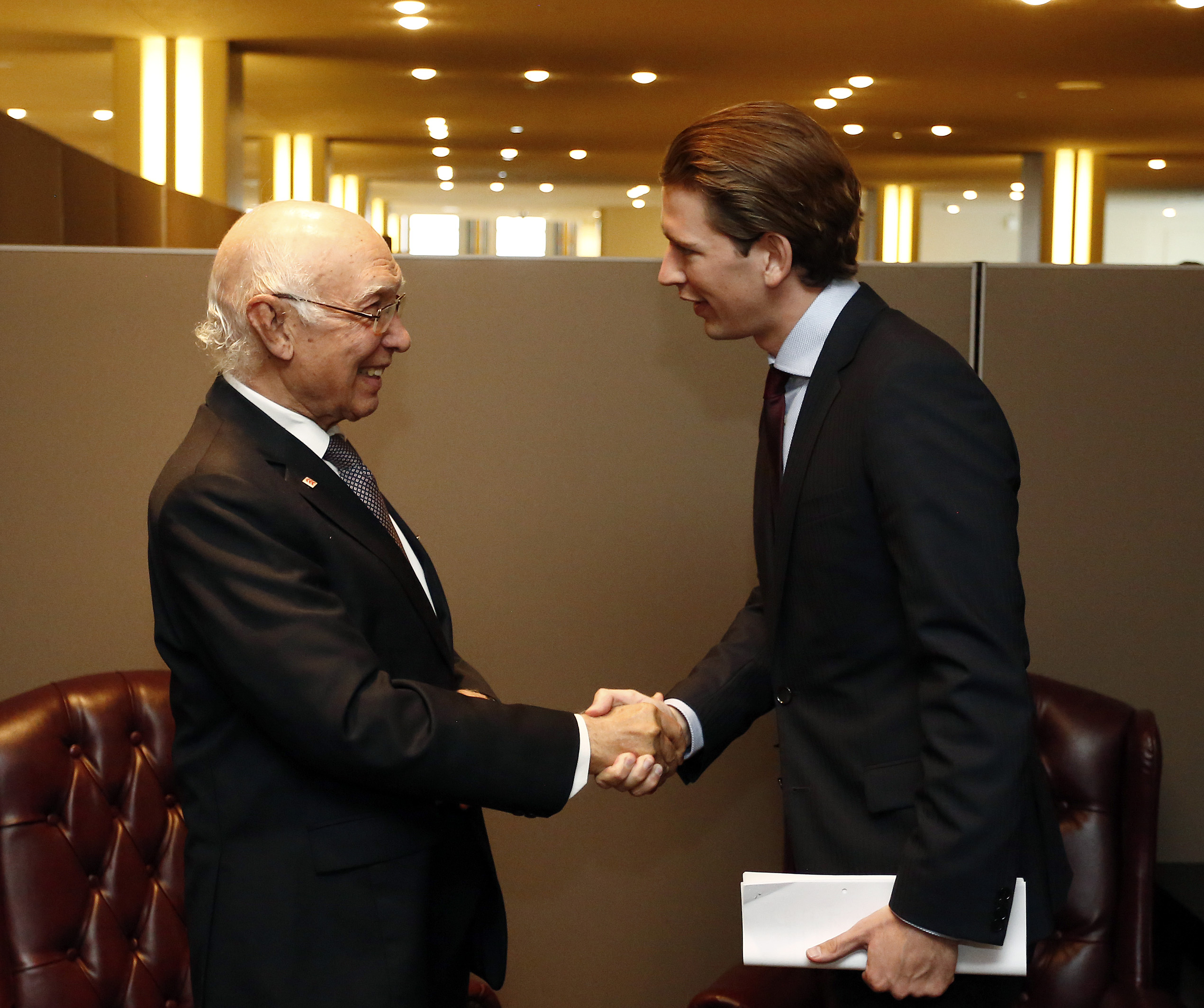 UNO Generalversammlung. BM Sebastian Kurz trifft den pakistanischen de facto Außenminister. New York, 30.09.2015, Foto: Dragan Tatic